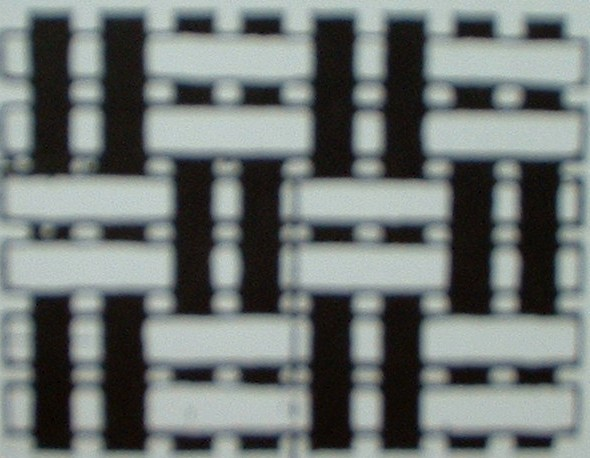 Struktur der Panamabindung